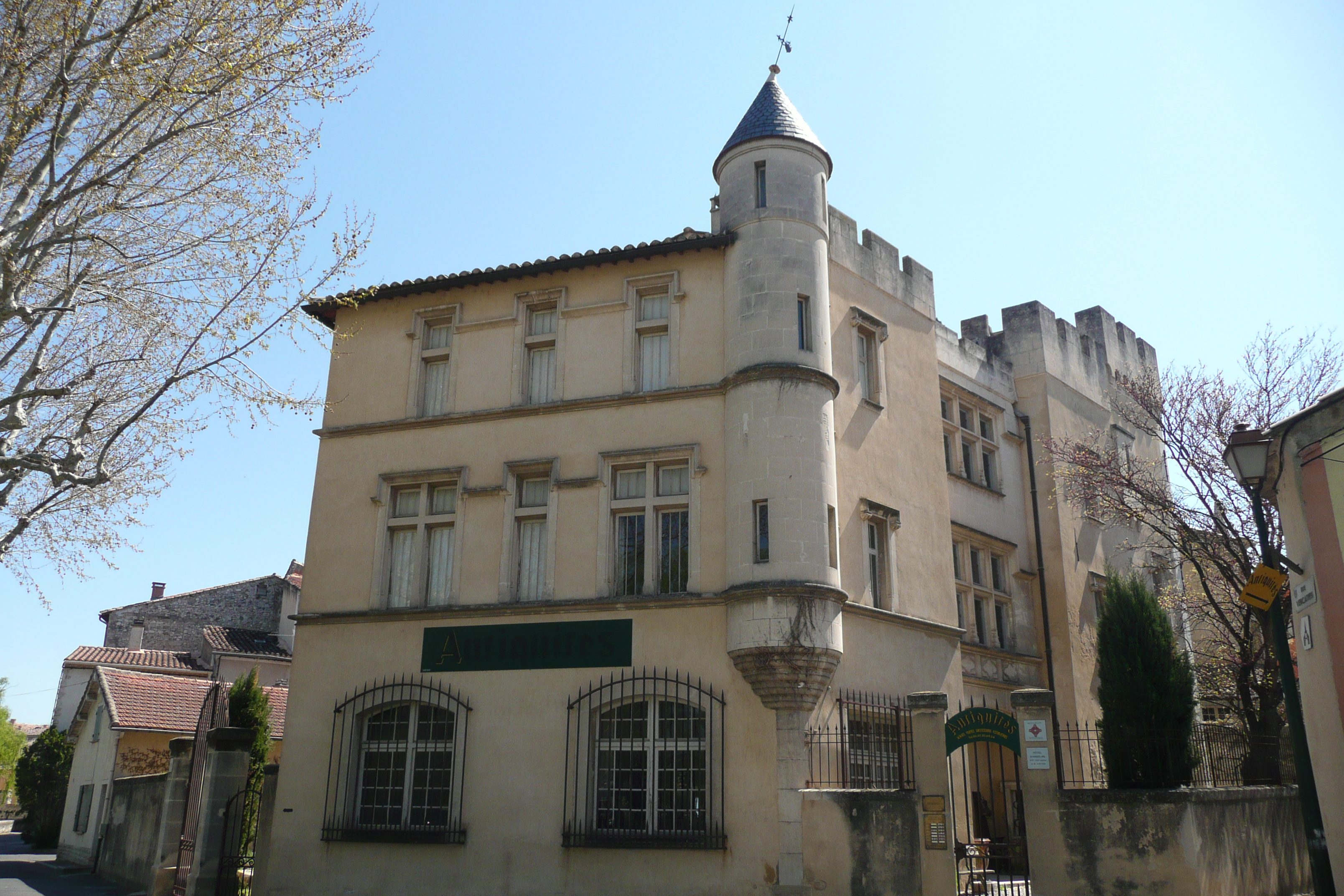 Hôtel d'Anselme 16 à 19 èmes siècles à Pernes-les-Fontaines